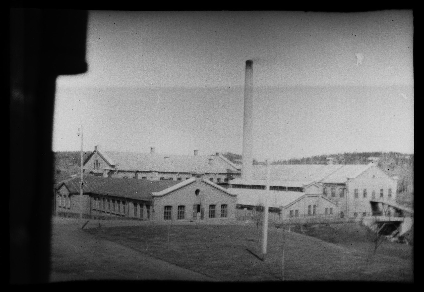 HS Modeller Kymmene, Karl Swanljung -adressen 4 valokuvafilmi, selluloosanitraatti, leveys 82 mm, korkeus 55 mm Asiasanat: valokuvat, Kymmene, yhtiö (Kymmene Aktiebolag, Kymin Oy), Kymintehdas, paperitehdas ja puuhiomo, Kuusankoski, teollisuuslaitos, yleiskuva, eksteriööri, puunjalostus, punatiilirakennus(useita) ; Karl Swanljung -adressi, malli teokseen Paperitehdas Hugo Simbergin jäljillä - Kansallisgalleria, Hugo Simbergin arkisto